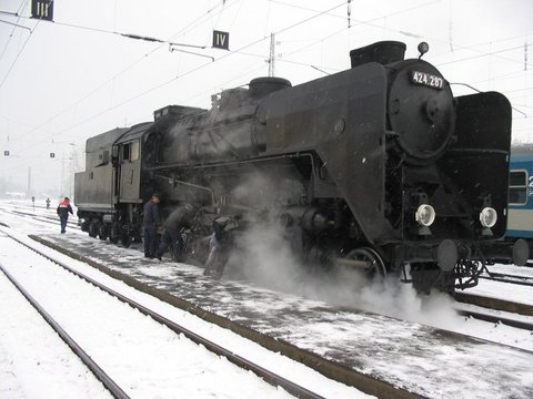 A MÁV Nosztalgia 424,287 sorozatú mozdonya.